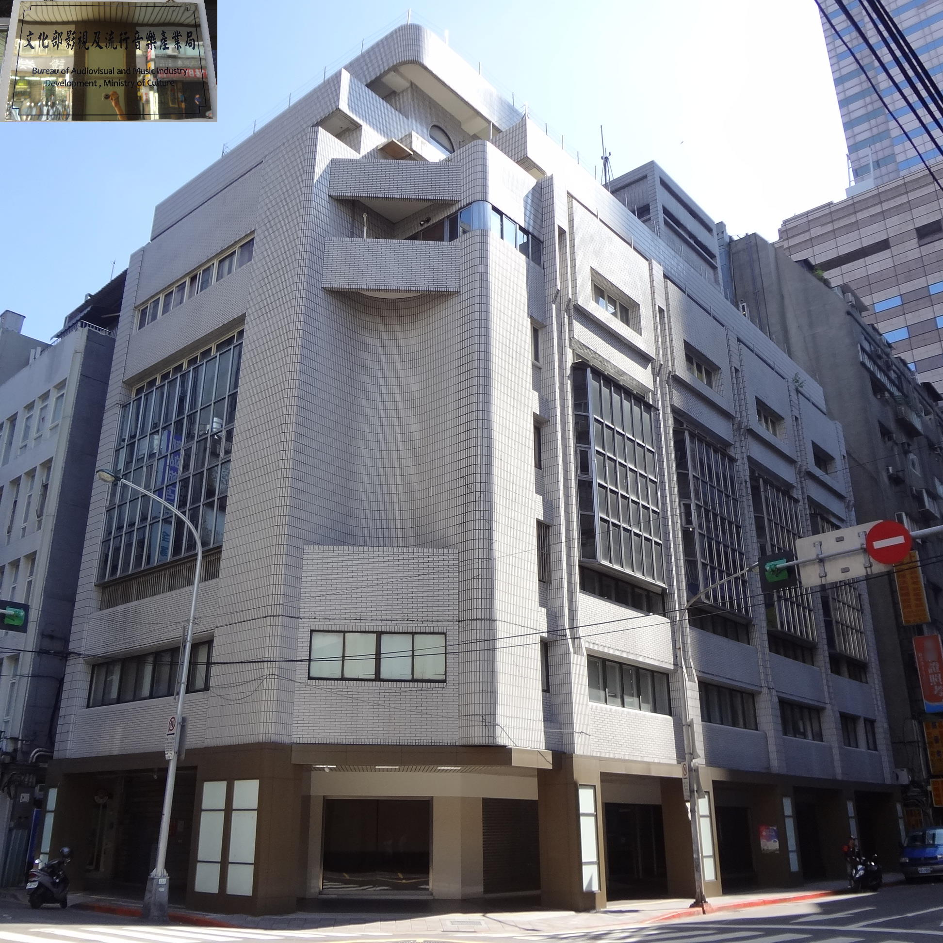 中華民國文化部影視及流行音樂產業局，地址：臺北市中正區開封街一段3號（原經濟部第二辦公室）。